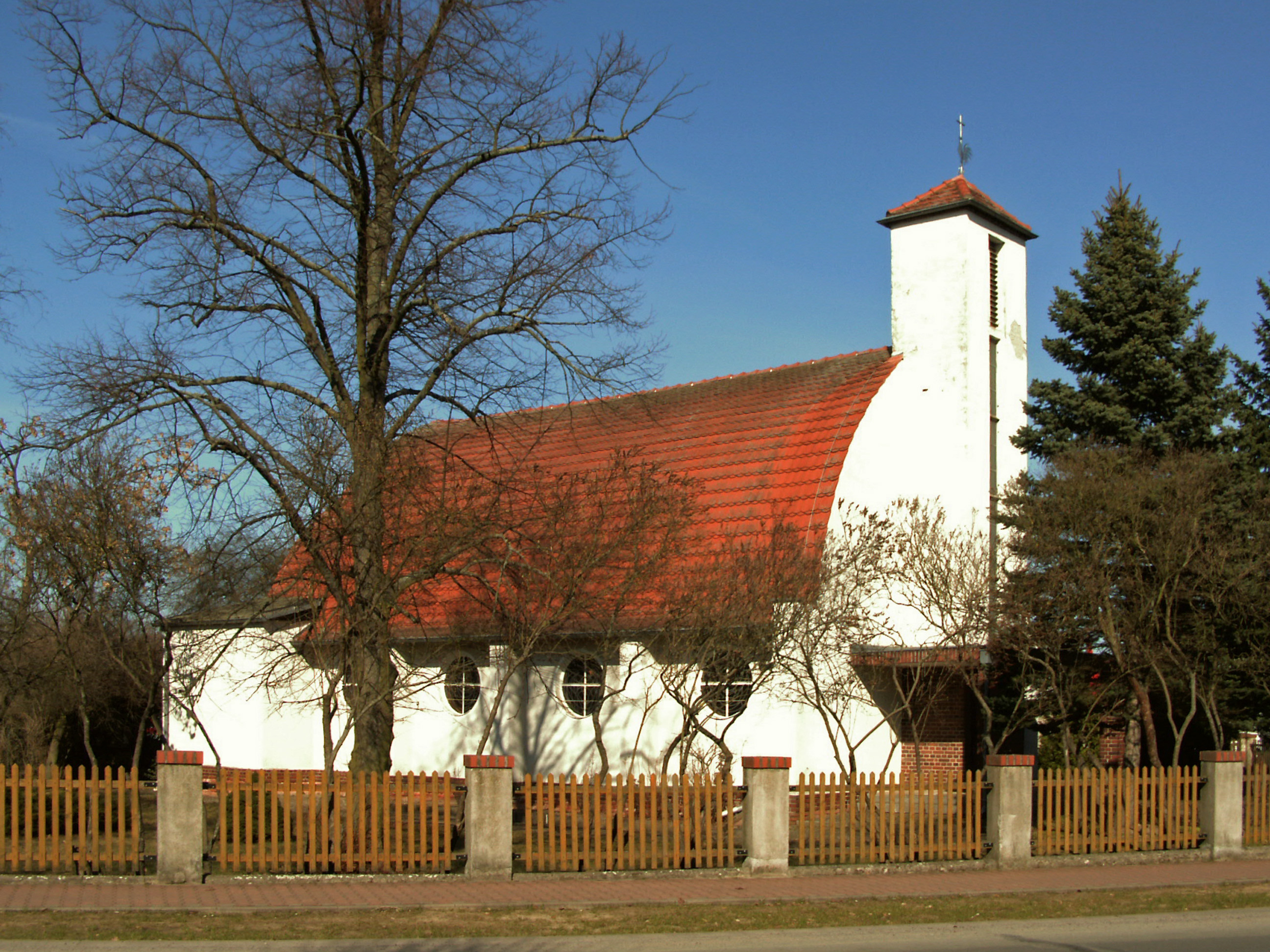 Katholische Kirche St. Elisabeth in Tangerhütte, Landkreis Stendal